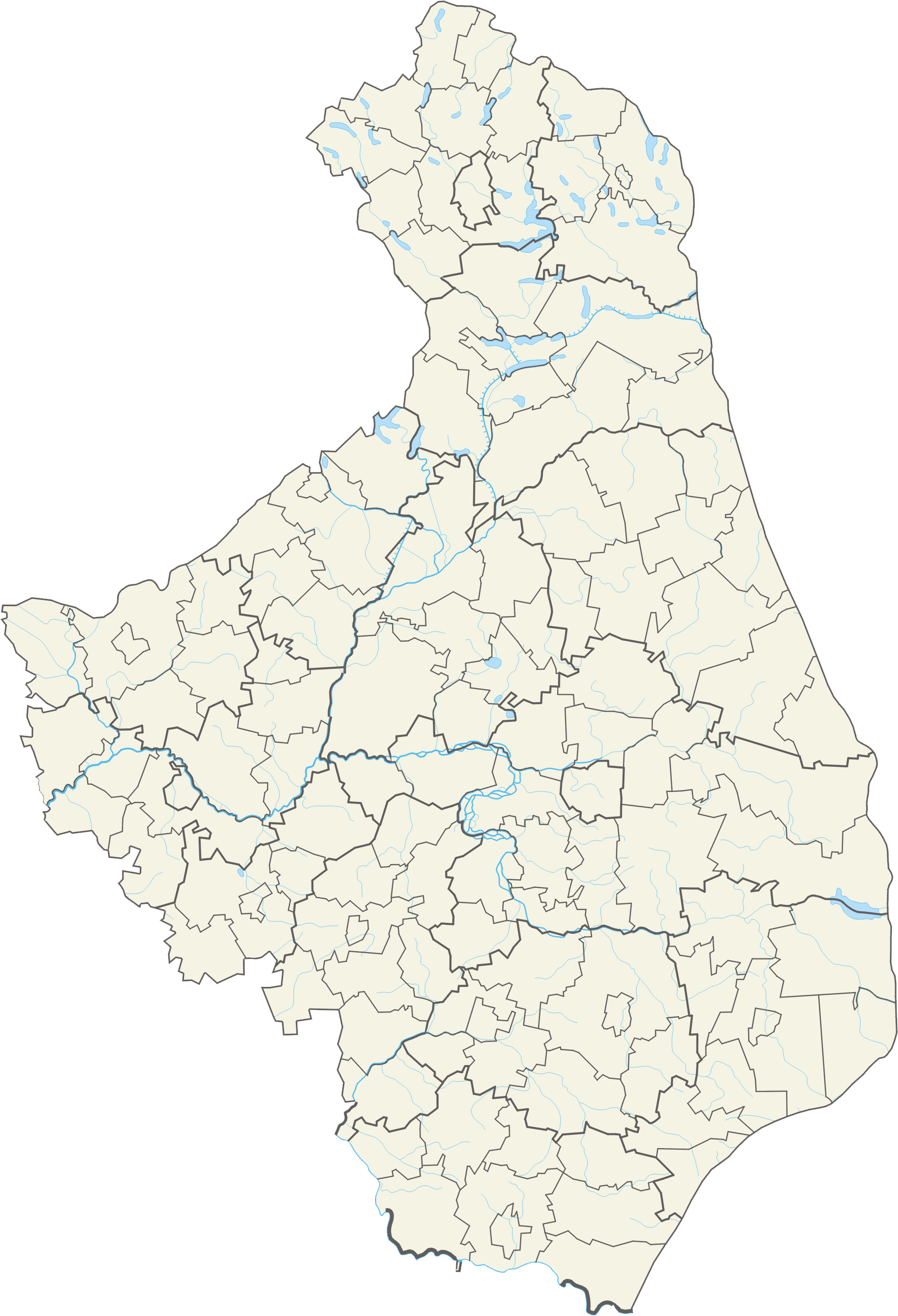 Województwo podlaskie – powiaty i gminyWspółrzędne graniczne mapy: N: 54.4104° N S: 52.2799° N W: 21.5929° E E: 23.9387° E